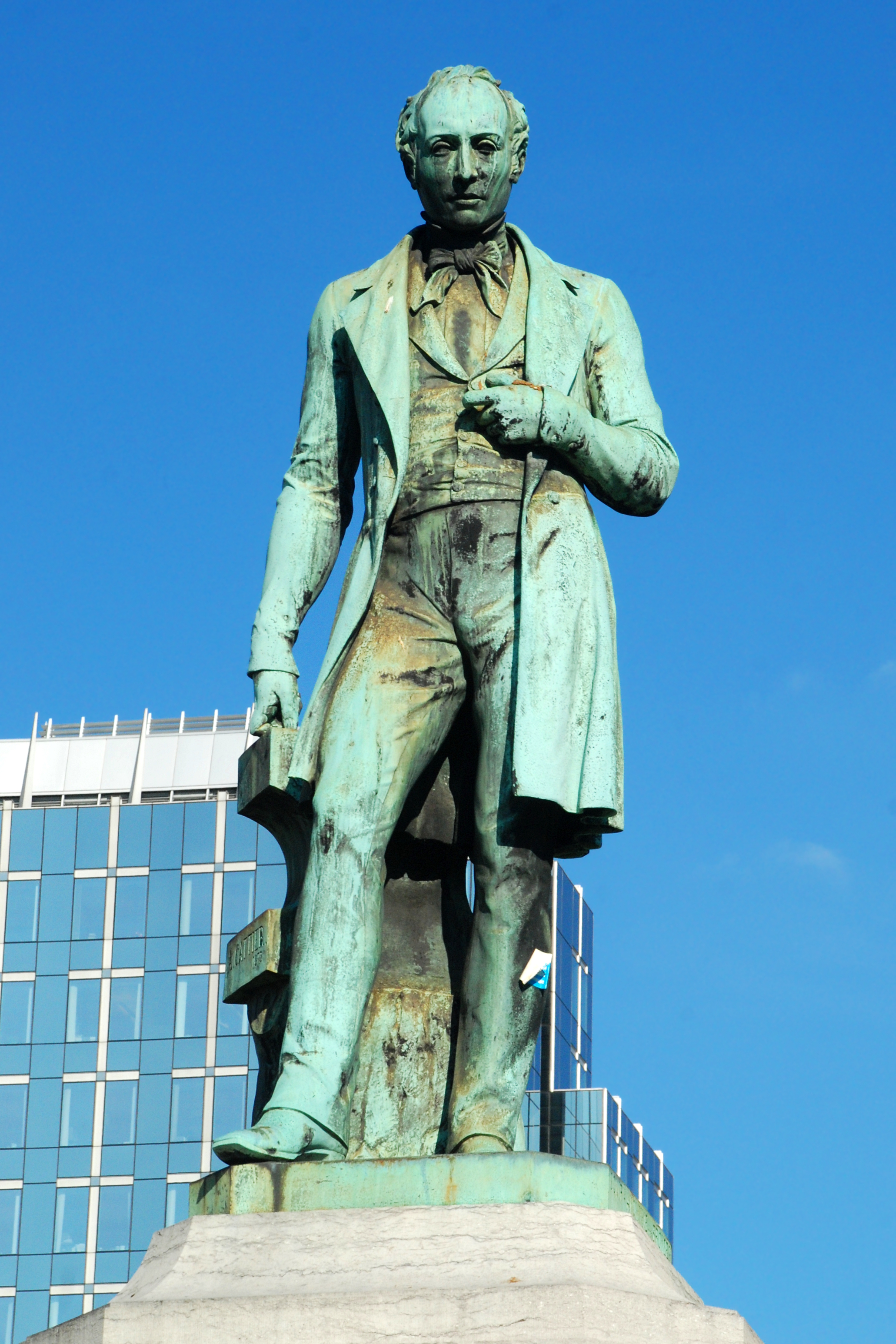 Belgique - Bruxelles - Place du Luxembourg - Monument à John Cockerill